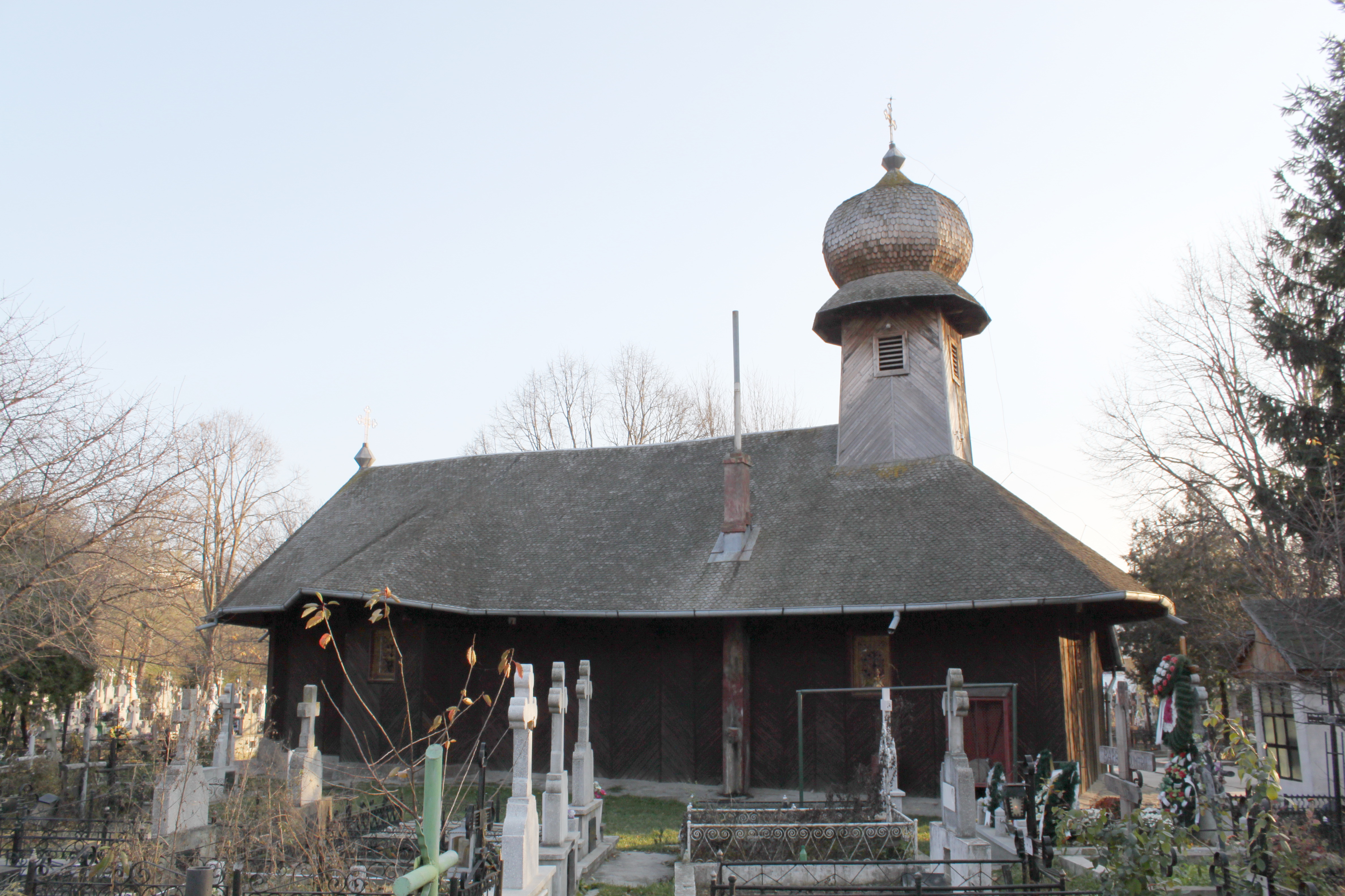 Biserica de lemn Adormirea Maicii Domnului din Piatra Neamţ, judeţul Neamţ. 01